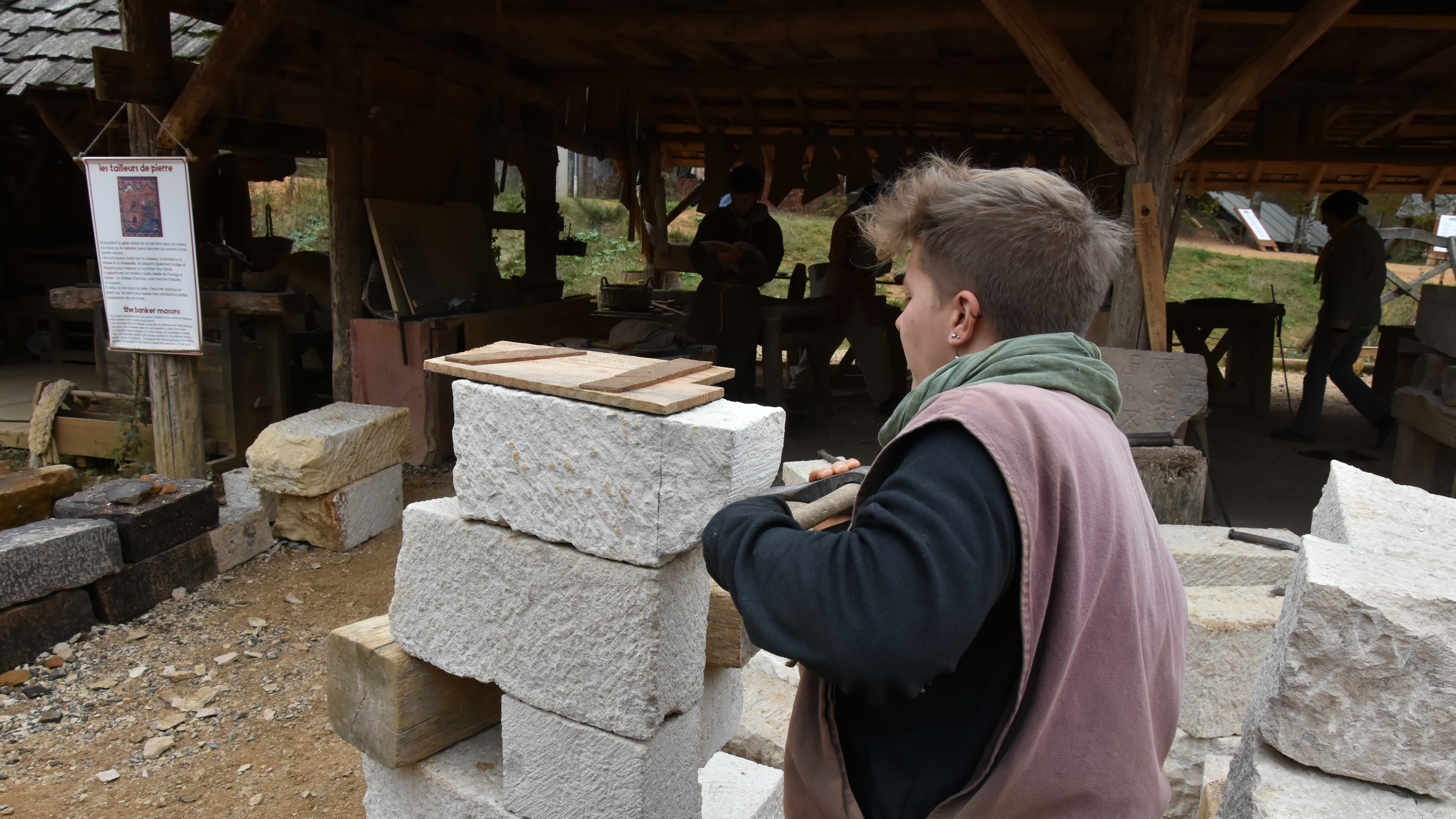 Kasteel van Guédelon - steenhouwer (vr.)